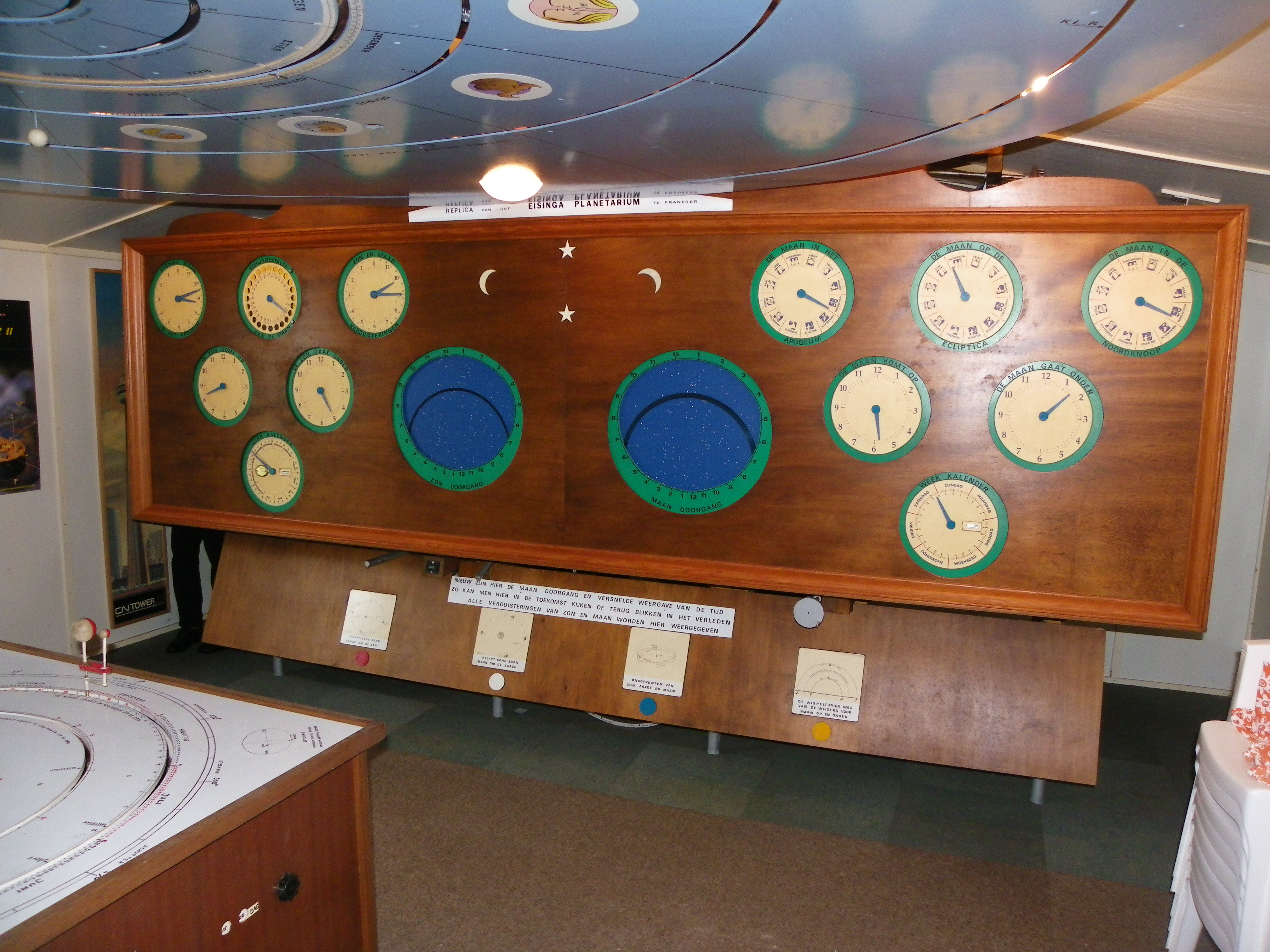 Op de wand bevinden zich 14 meters die de verschillende zon- en maanstanden weergeven.